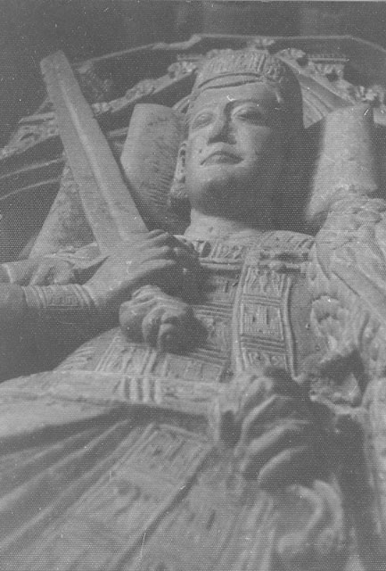 Iglesia de la Virgen Blanca. Sepulcro 1971 - Villalcázar de Sirga (Palencia) - Fotografía. Papel 750 x 105 mm B/N